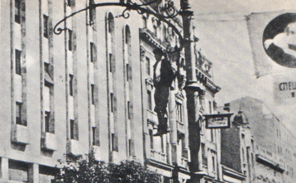 Srpskohrvatski / српскохрватски: Vešanje srpskih ustanika na Terazijama 1941.